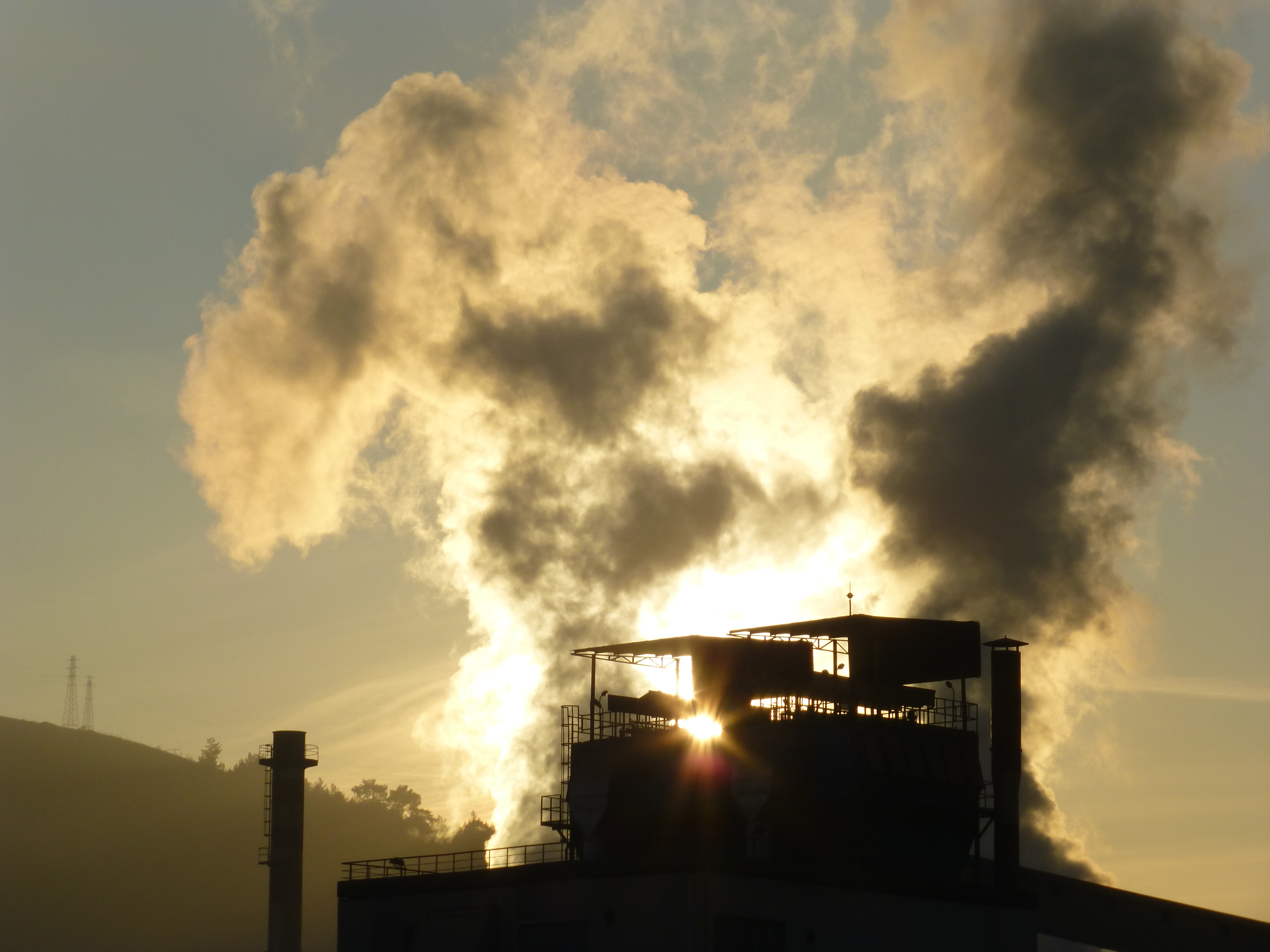 Kardemir